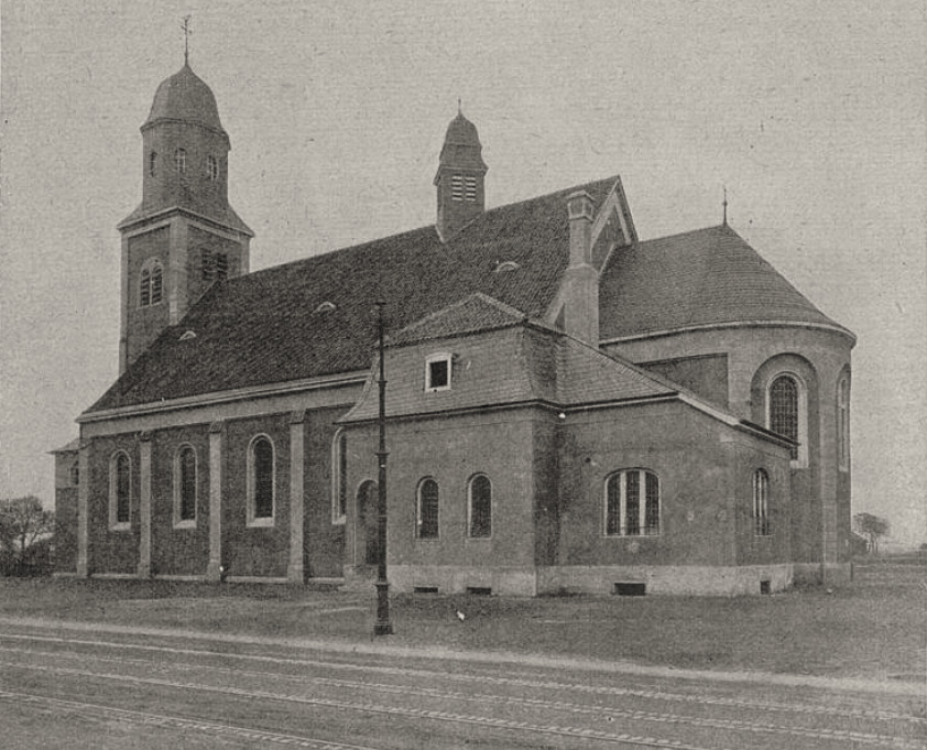 St. Michaelskirche in Düsseldorf-Lierenfeld. Einweihung am 29. September 1912. Foto Josef Henne, Düsseldorf